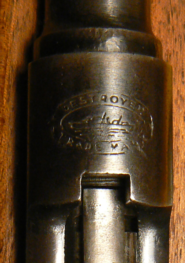 Detalle del grabado en recámara de la marca Destroyer.